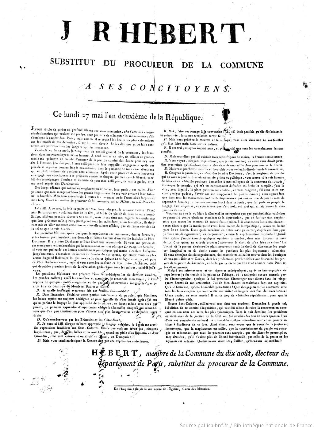 Affiche rédigée par Hébert en prison le 27 mai 1793 à la veille de la chute des Girondins (2 juin 1793)